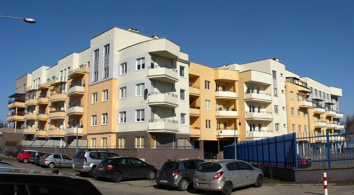 Zabudowa na osiedlu Wzgórze Wolności w Bydgoszczy